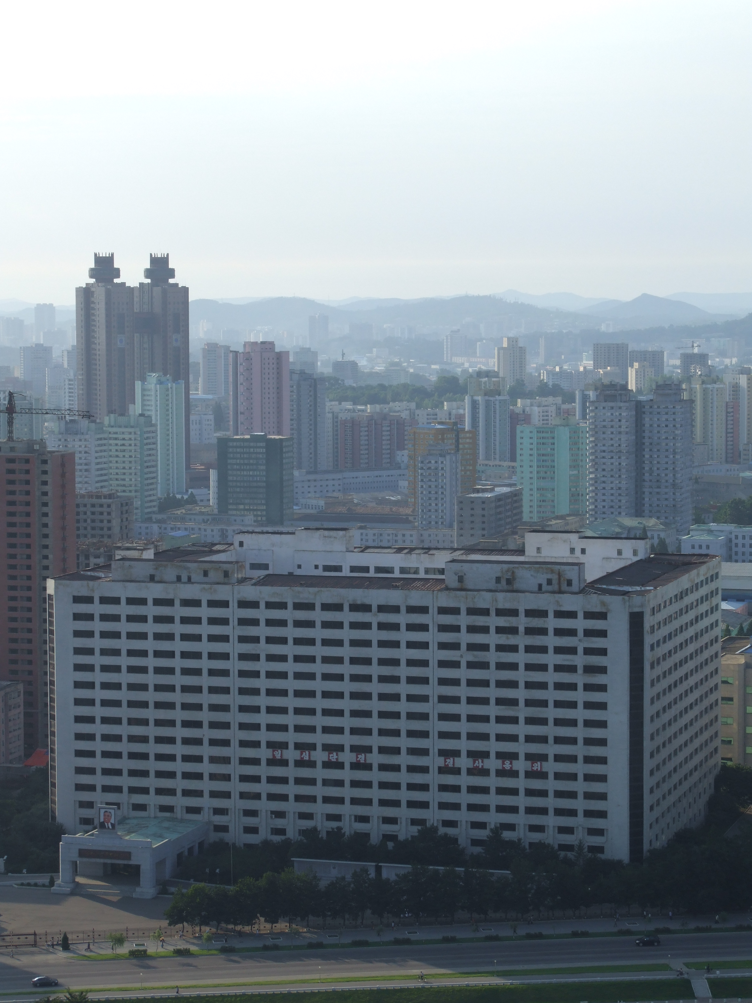 Blick vom Yanggakdo International Hotel über Pjöngjang